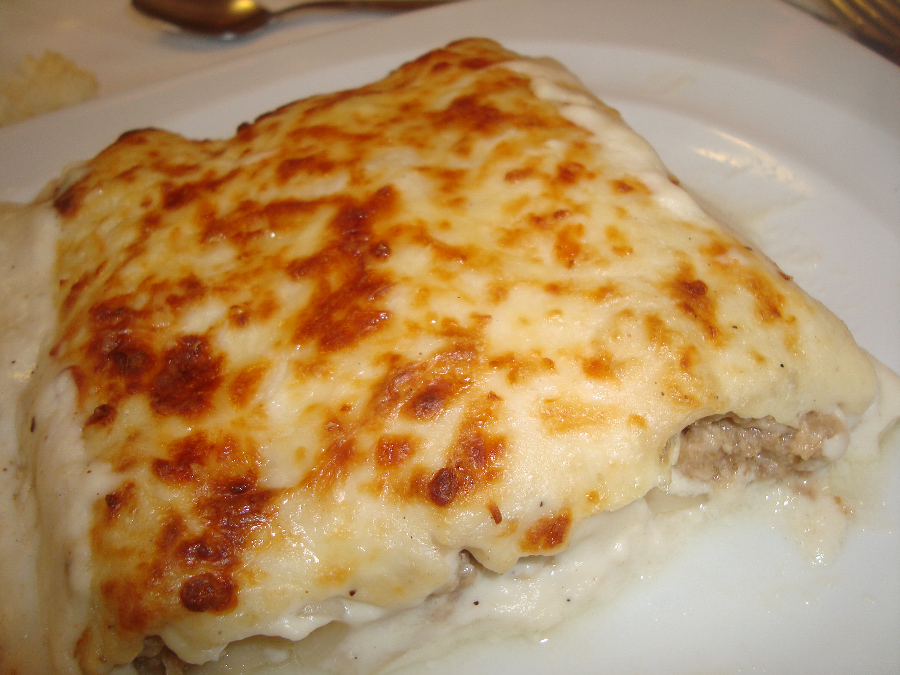 Canelones de carne cubiertos con bechamel, queso rallado y cocidos al horno.